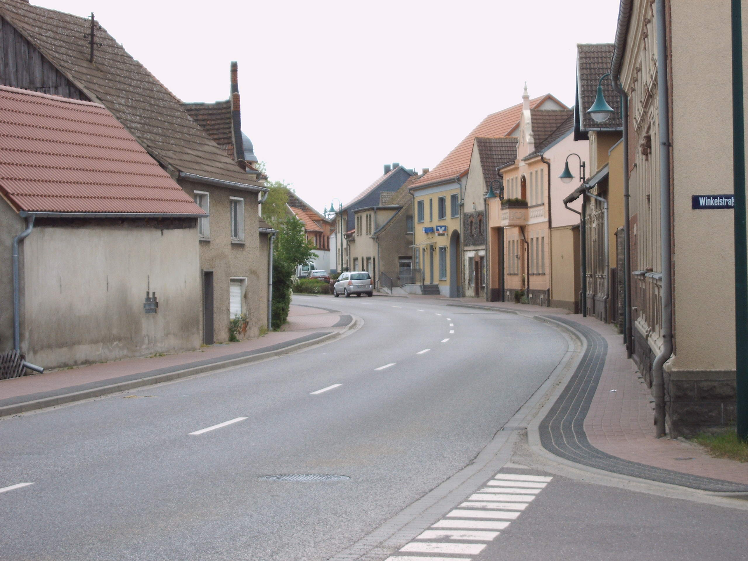 Hauptstraße durch Tucheim, Deutschland Bild aufgenommen am 22.5.2006 durch Olaf Meister